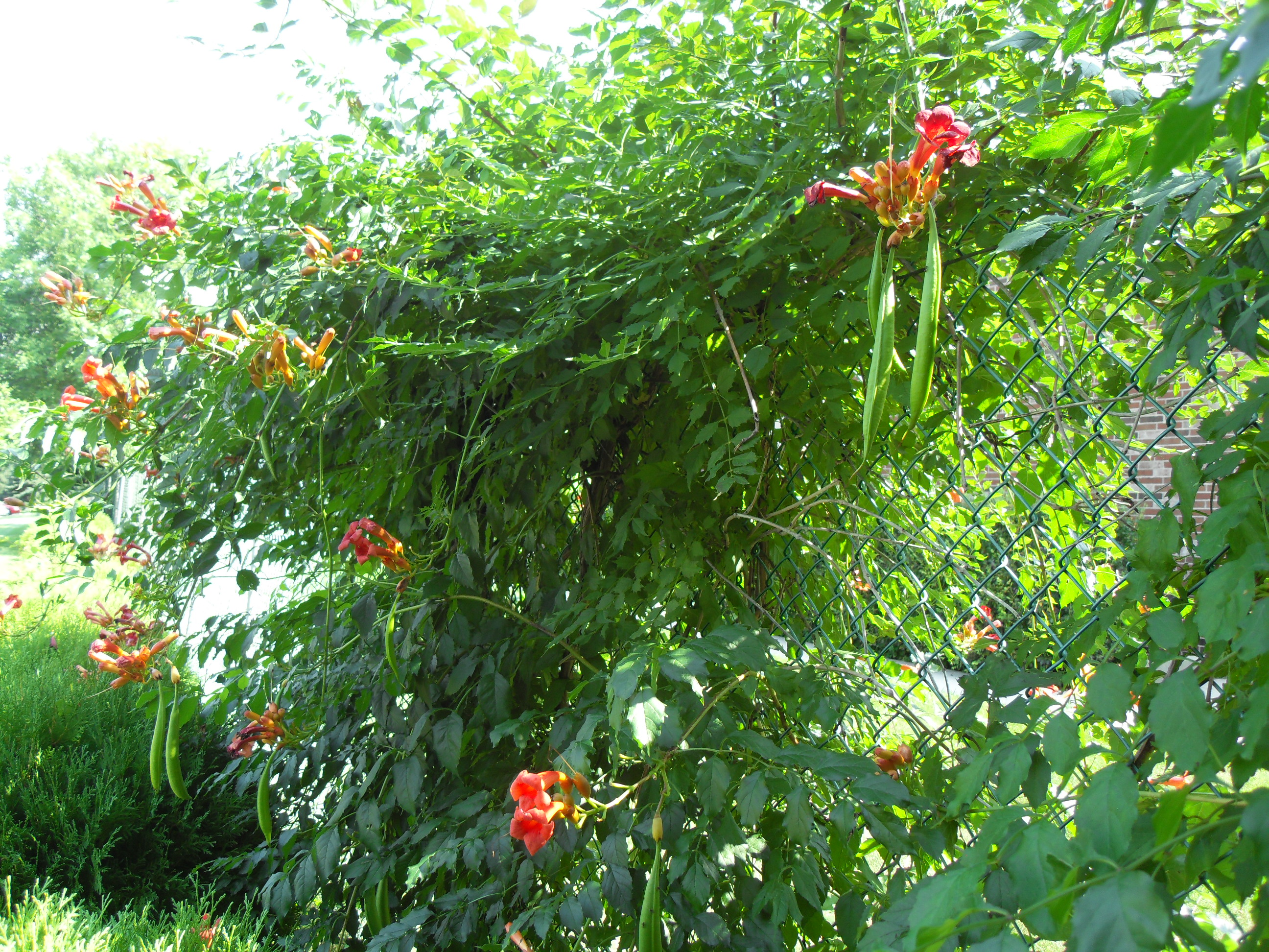 Плод лианы Campsis. Лиана красиво декорирует забор. Цветет очень долго, на растении можно одновременно видеть бутоны, раскрывшиеся цветы и плоды-стручки.